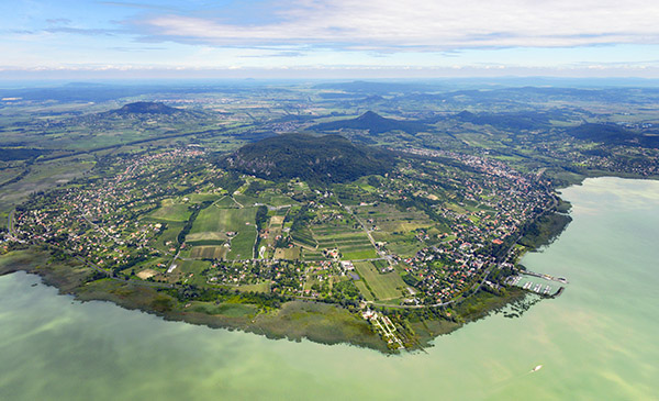 Badacsonytördemic és Badacsonytomaj, Tanúhegyek, Balaton felvidék, légi felvétel